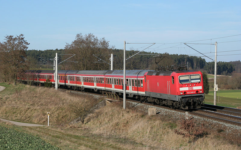 Nahverkehrszug Nürnberg - Treuchtlingen mit Br 143 bei Ellingen